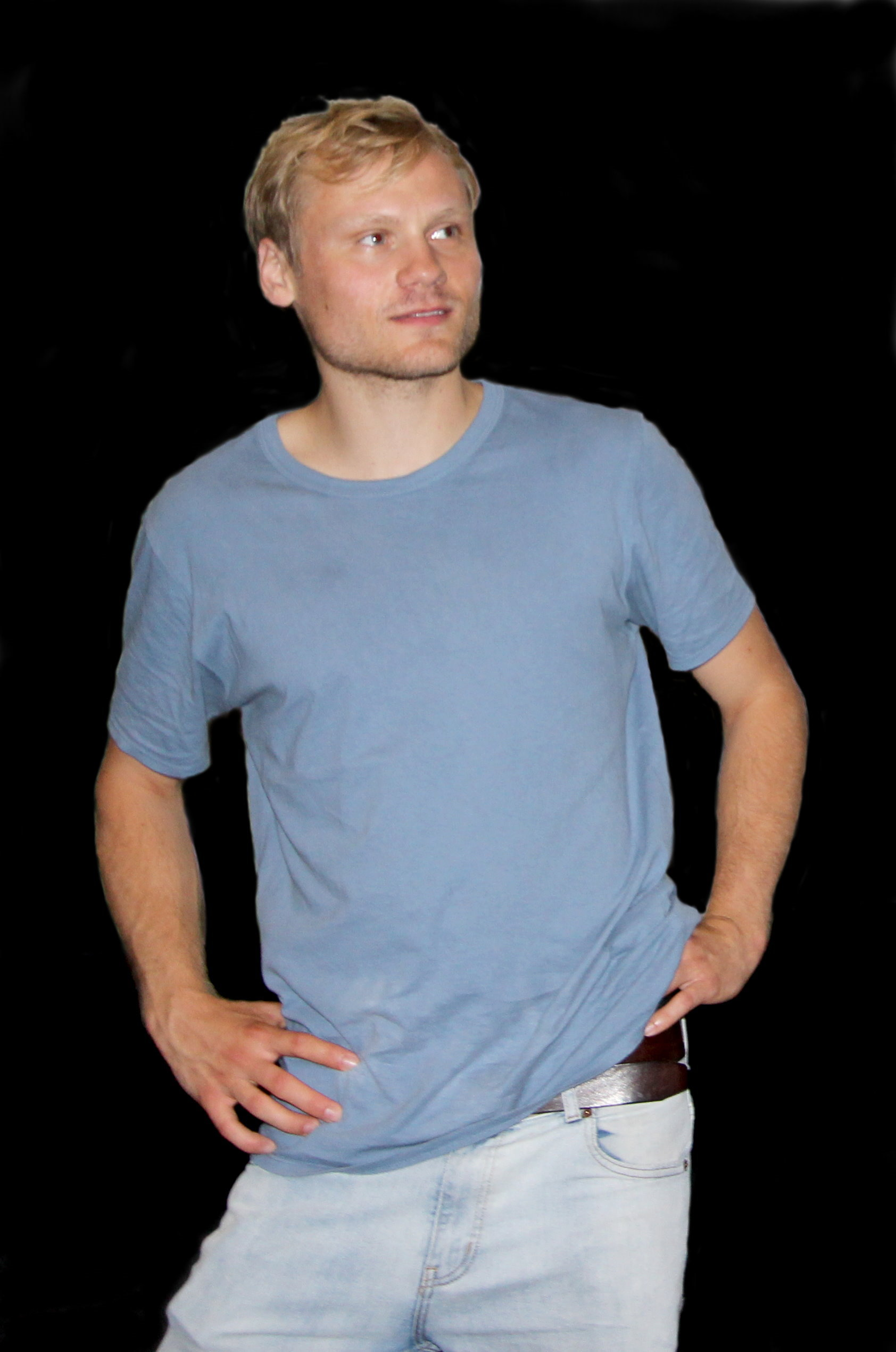 40223 Düsseldorf, Brunnenstraße 20. Filmvorstellung "303" im Metropol-Filmkunstkino. Anton Spieker (* 7. März 1989 in Berlin) ist ein deutscher Schauspieler. Aufnahme von 2018.